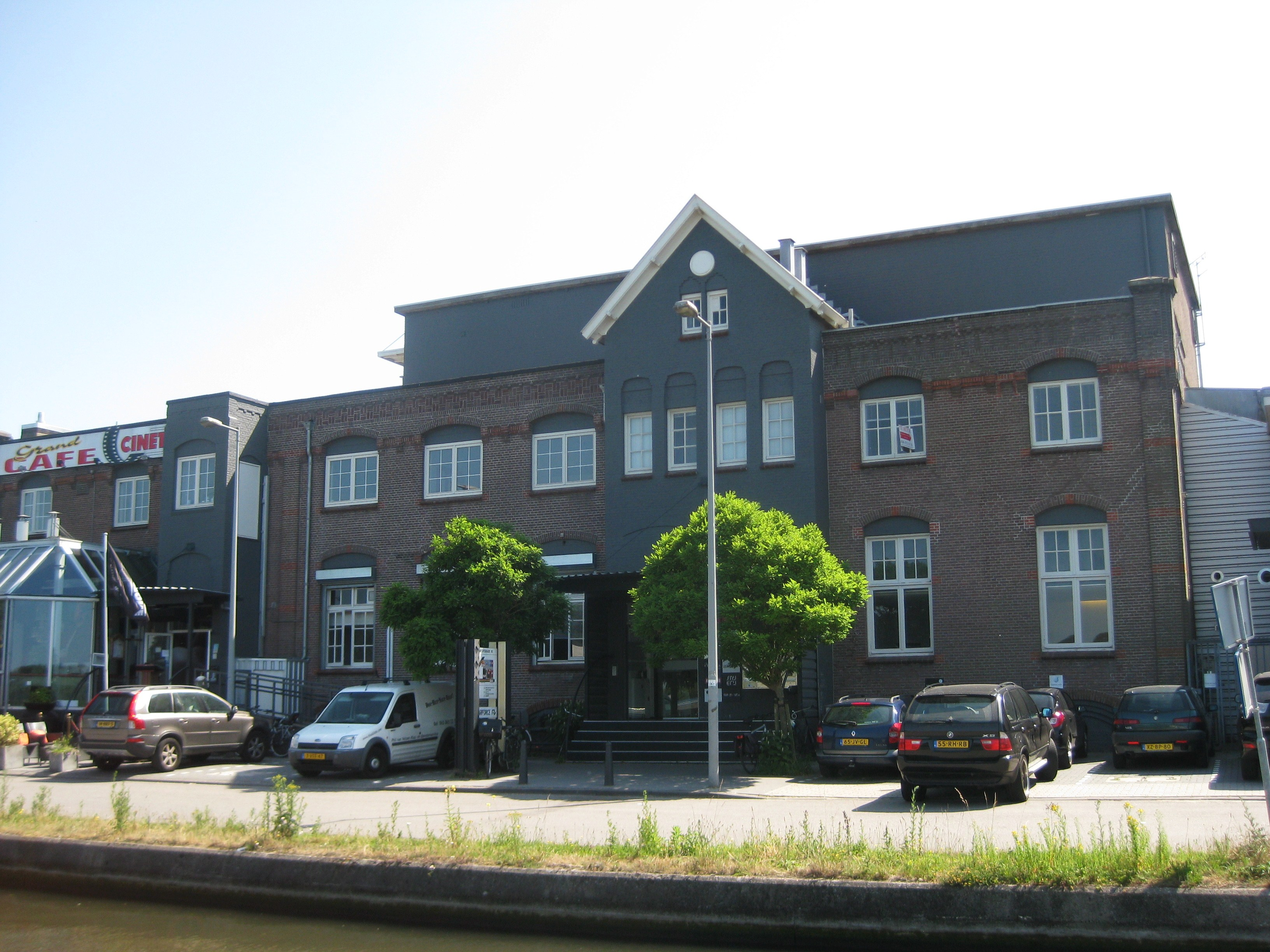 Het complex van de vroegere Cinetone Filmstudio's in Amsterdam aan de Duivendrechtsekade.